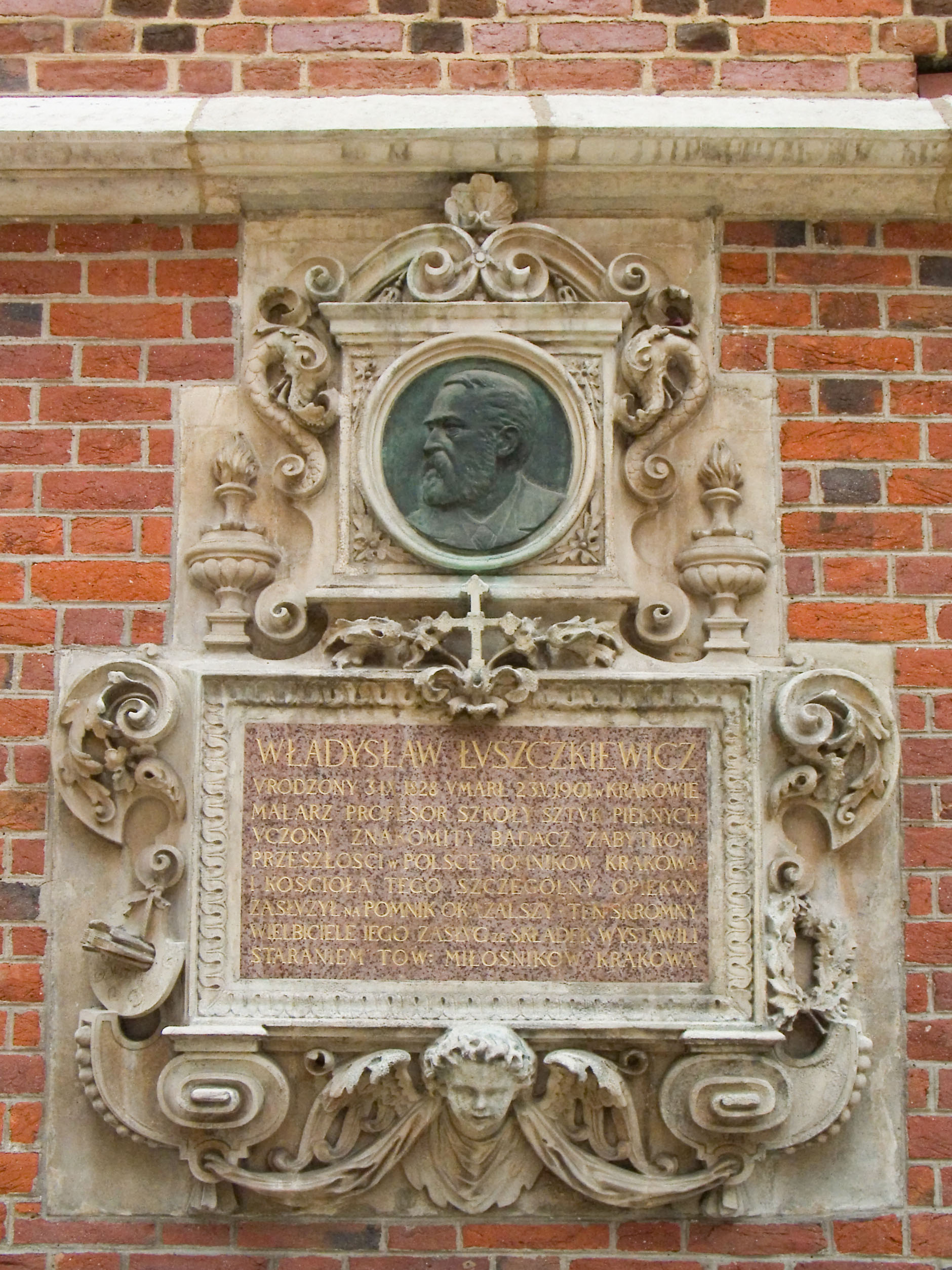 Tablica pamięci Władysława Łuszczkiewicza, wmurowana w ścianę kościoła Mariackiego w Krakowie Photo by Iwona Grabska